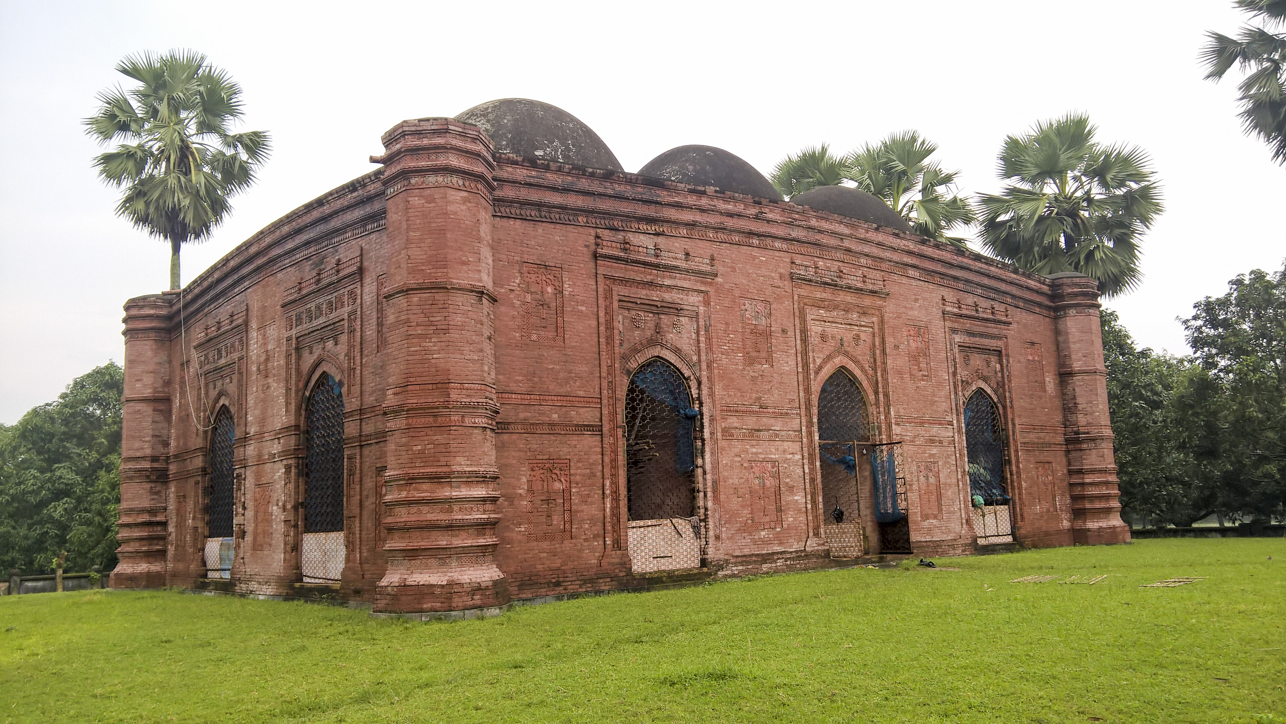 ধনিয়াচক মসজিদ বাংলাদেশের একটি ঐতিহাসিক স্থাপত্য যার অবস্থান চাঁপাইনবাবগঞ্জ জেলার ছোট সোনা মসজিদের সন্নিকটে। এটি বাংলাদেশ প্রত্নতত্ত্ব অধিদপ্তর এর তালিকাভুক্ত একটি প্রত্নতাত্ত্বিক স্থাপনা।